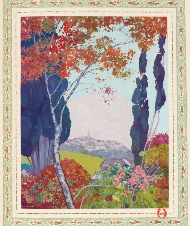 Illustration dans l'ouvrage La nuit vénitienne, Fantasio, Les caprices de Marianne d'Alfred de Musset, édition de 1913 (BNF/gallica)